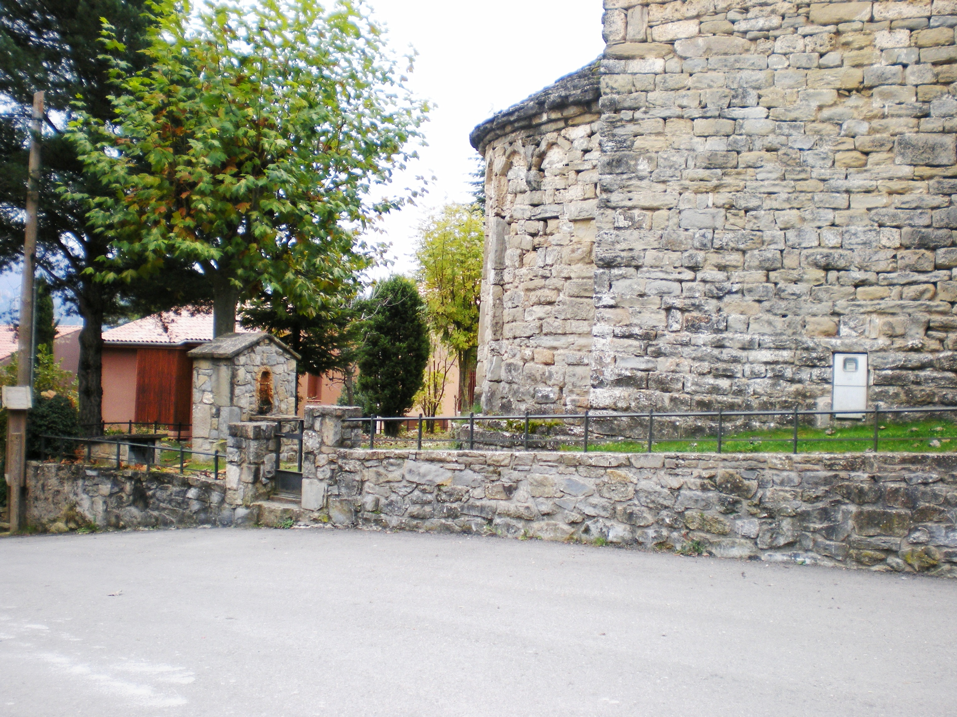 Font de la Santa Creu dels Ollers, al terme de Sant Llorenç de Morunys (Solsonès)